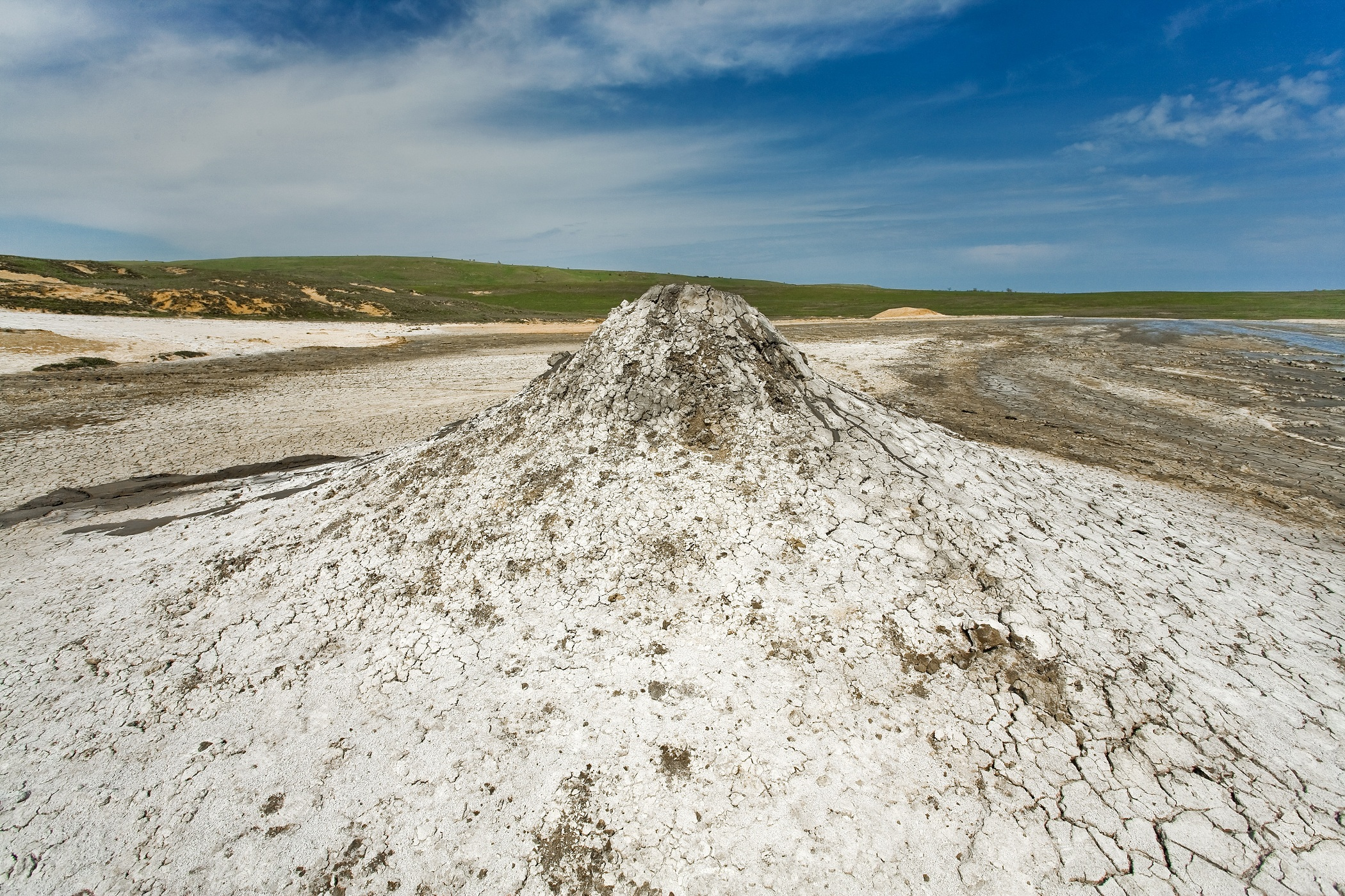 Грязьова сопка Андрусова, Крим, Ленінський р-н, с. Бондаренкове.